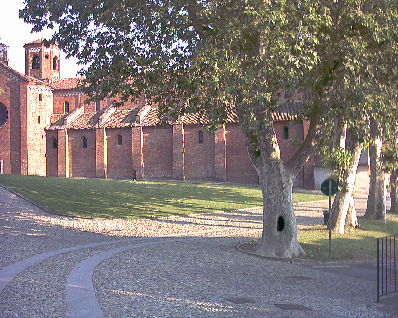 foto di bi80 dell'abbazia di Morimondo